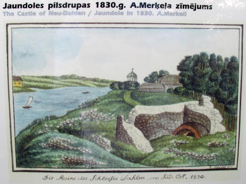 Vana joonistus XIX sajandi I poolest.